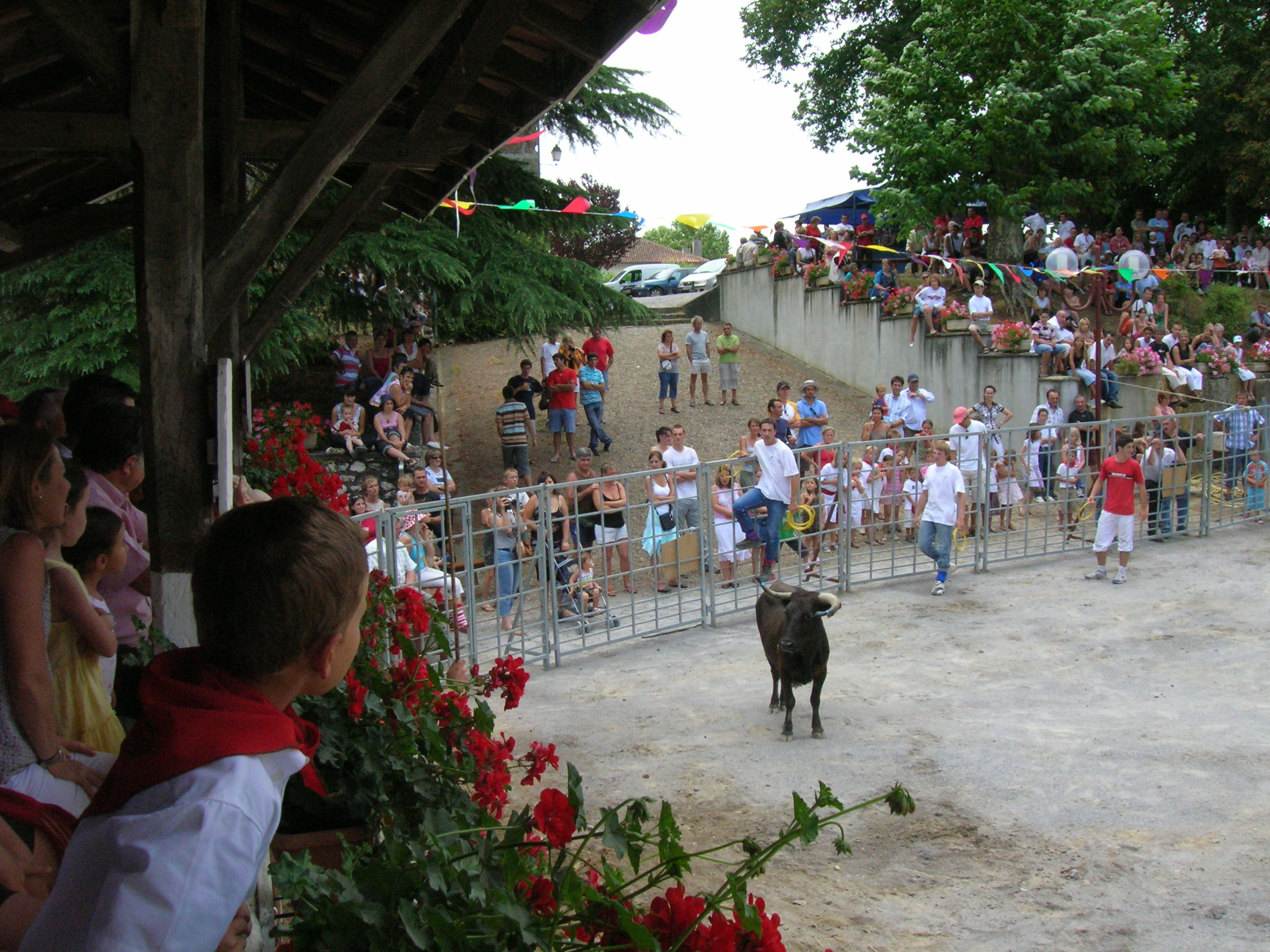 Arènes de Baigts